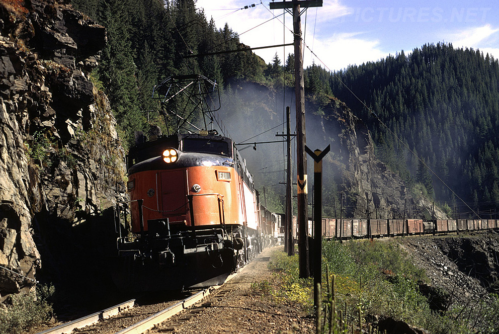 milw1